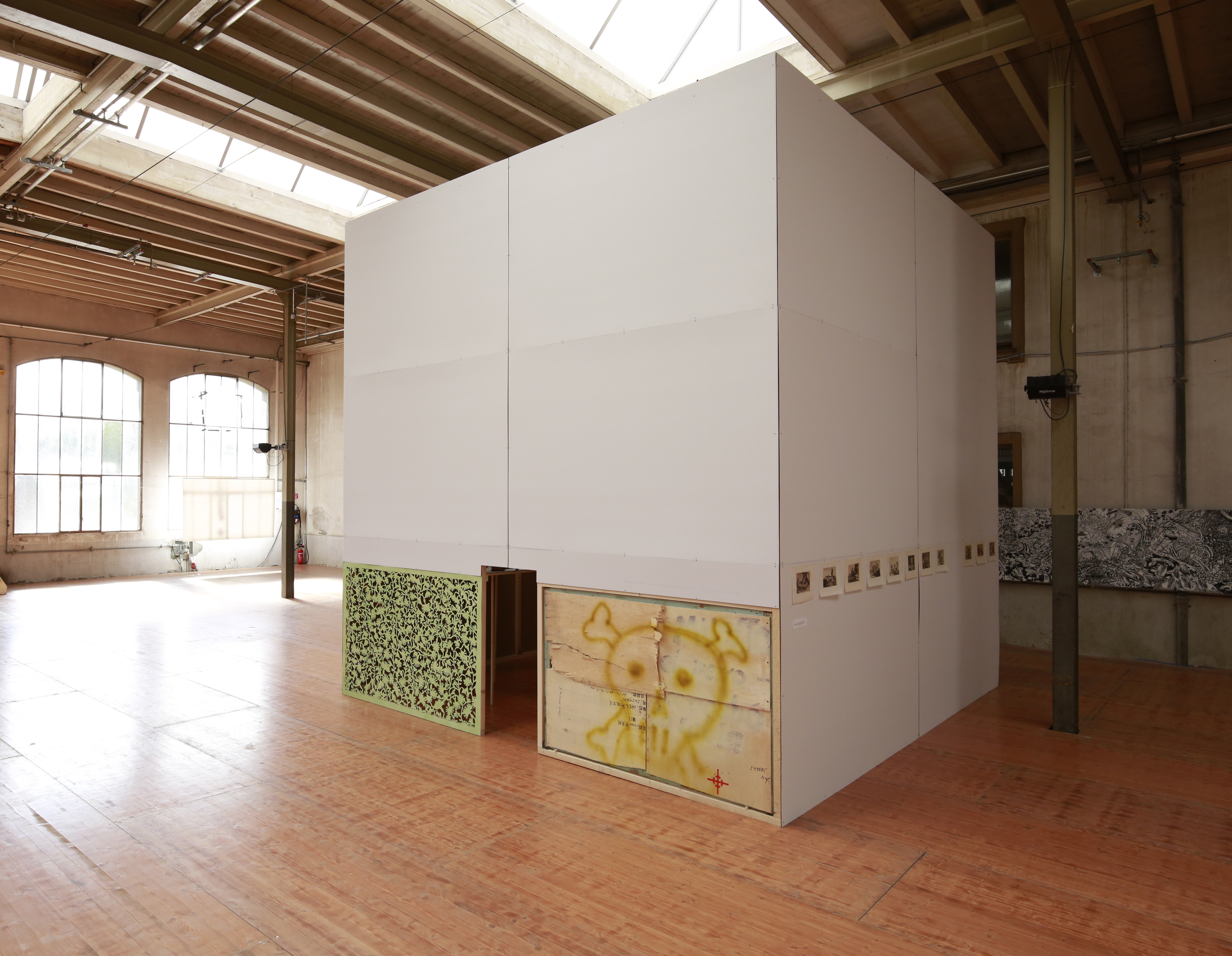 «Goya – También mañana florecerán las flores» Installation. Tramdepot Bern. 2016 Multimedia Aussenansicht